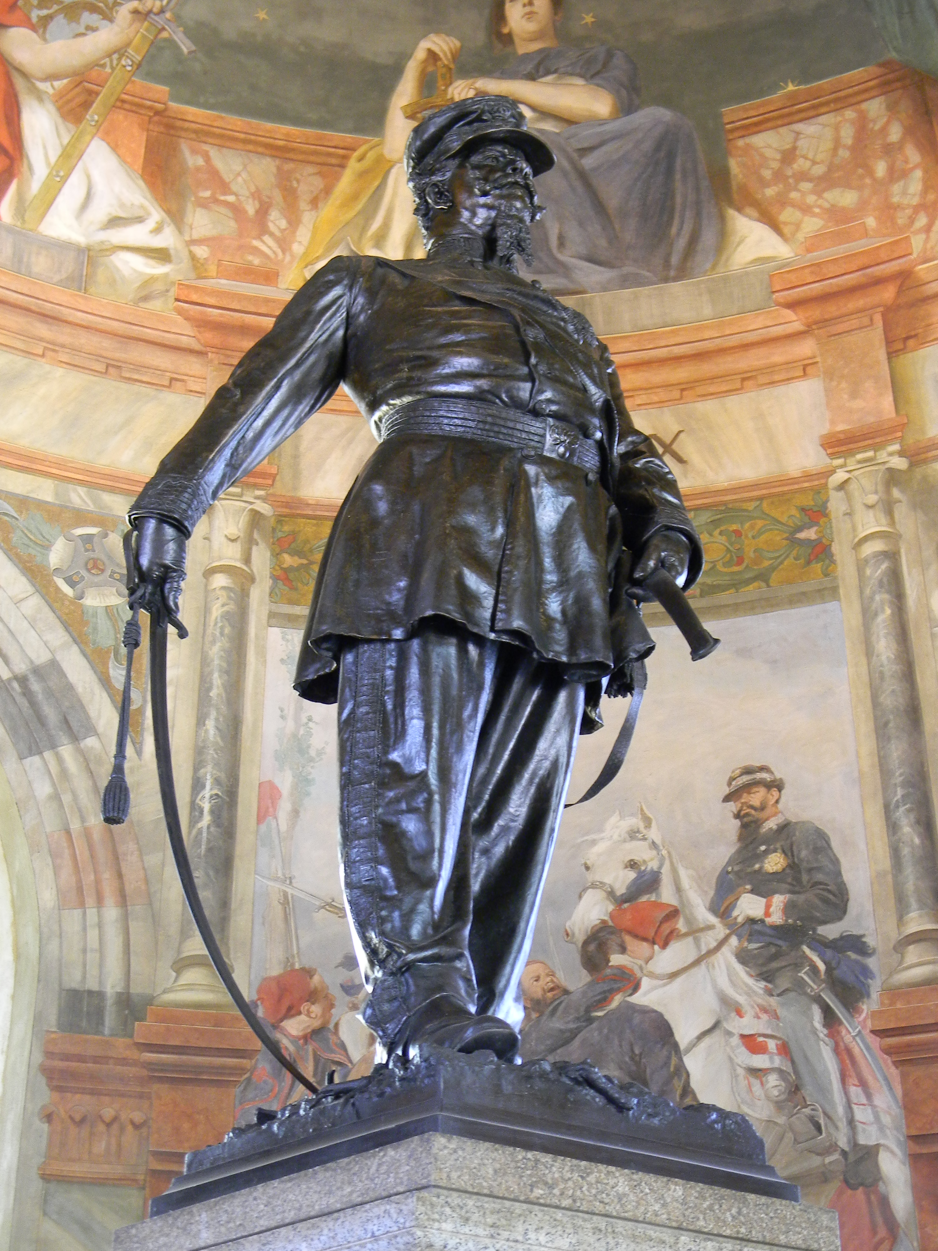 Statue de Victor-Emmanuel II de Savoie dans la tour de San Martino en Italie.